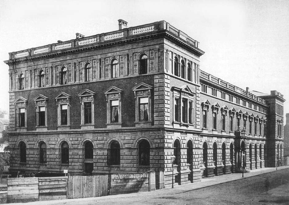 Polizeidirektion Braunschweig an der Münzstrasse